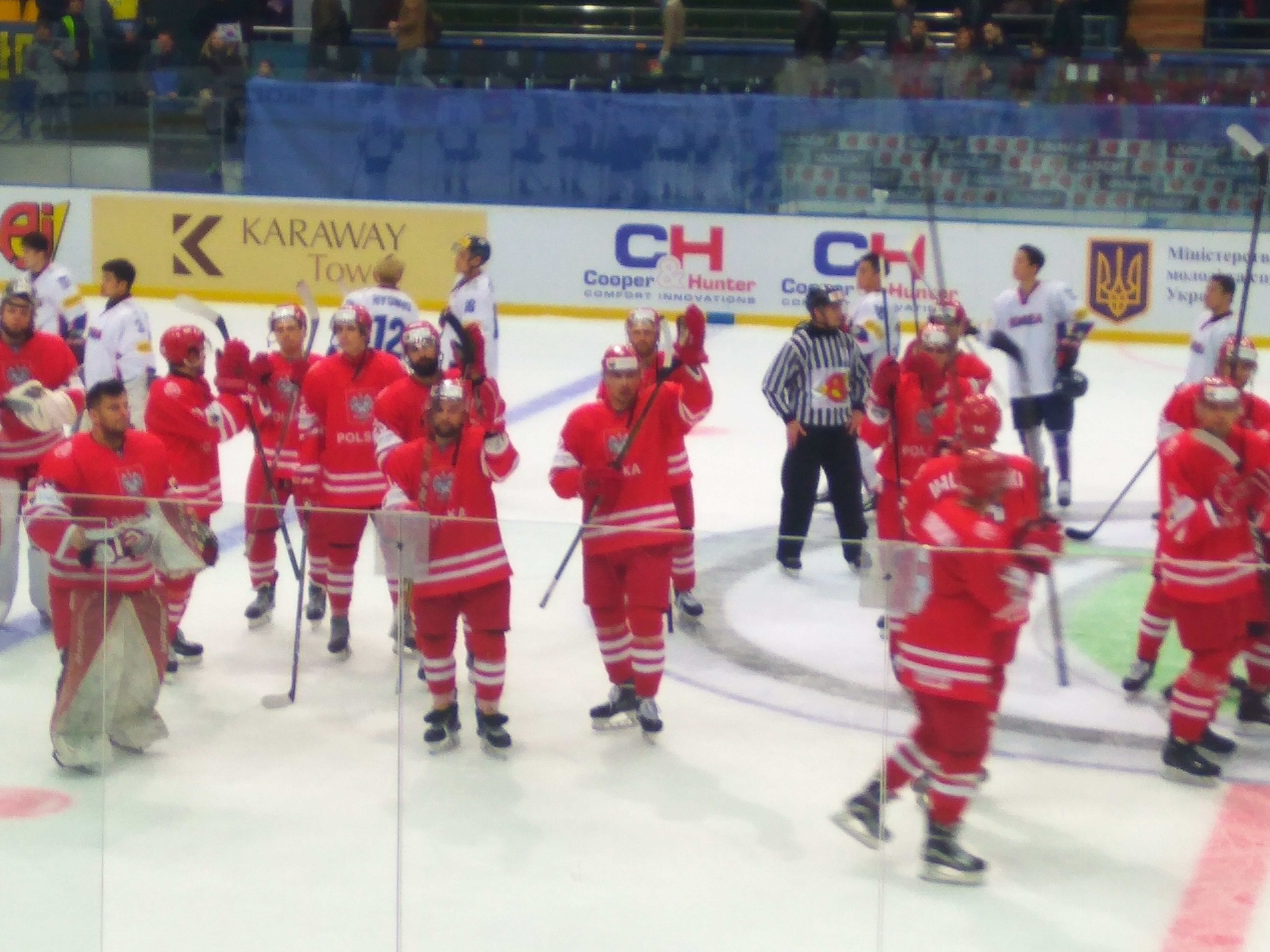 Чемпіонат світу з хокею 2017 у першому дивізіоні. Республіка Корея - Польща